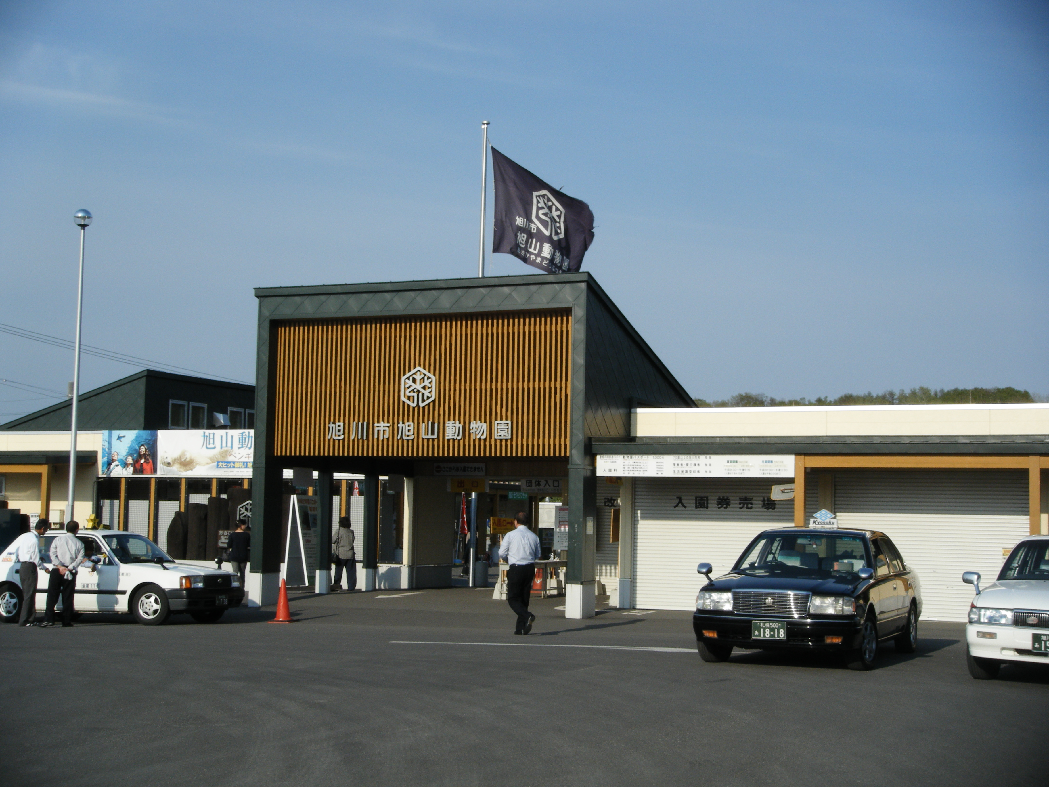 旭川市旭山動物園、正門。